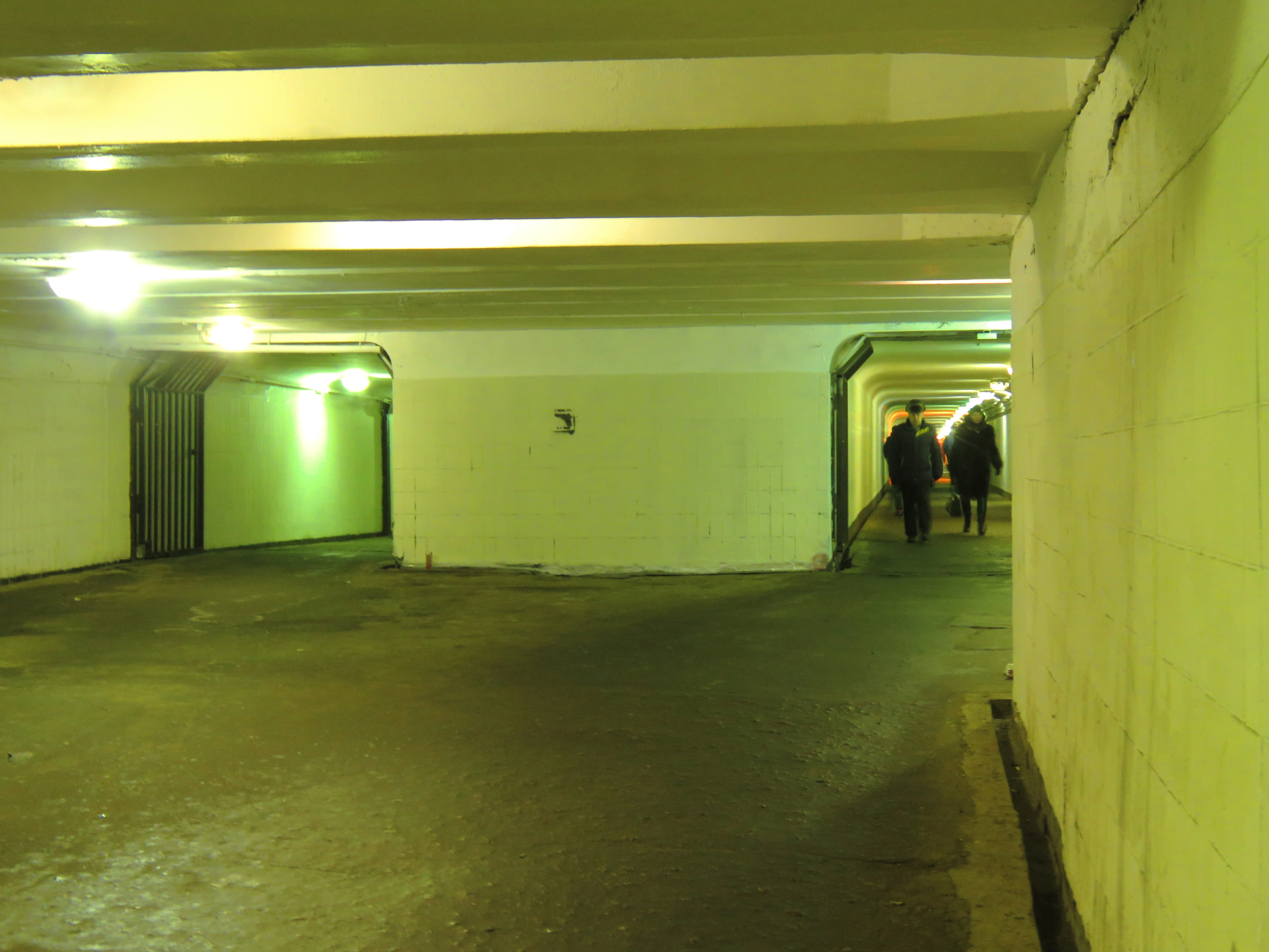 Подземный переход у станции метро «Выборгская» (Санкт-Петербург)